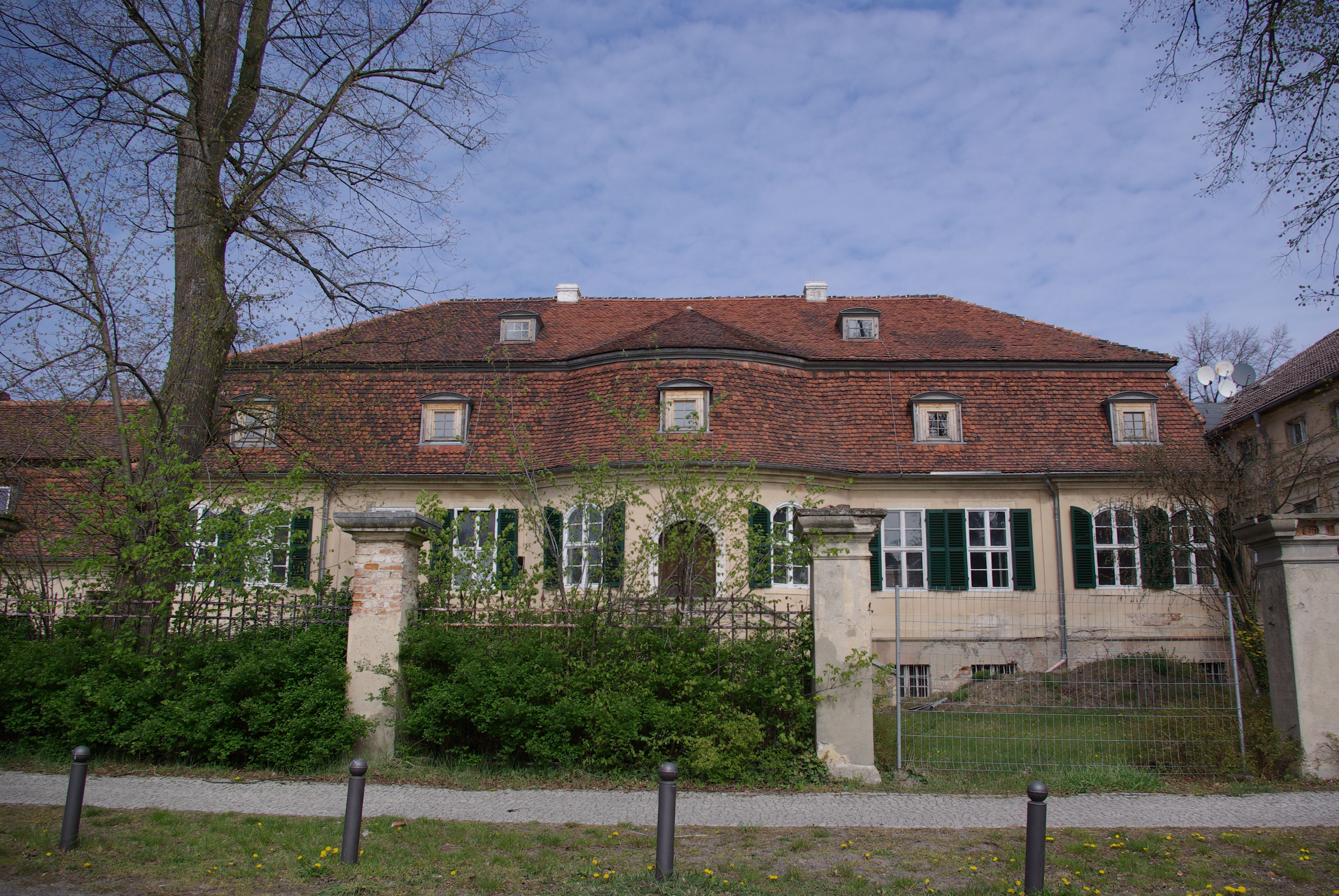 Groß Kreutz in Brandenburg. Das Gutshaus steht unter Denkmalschutz.